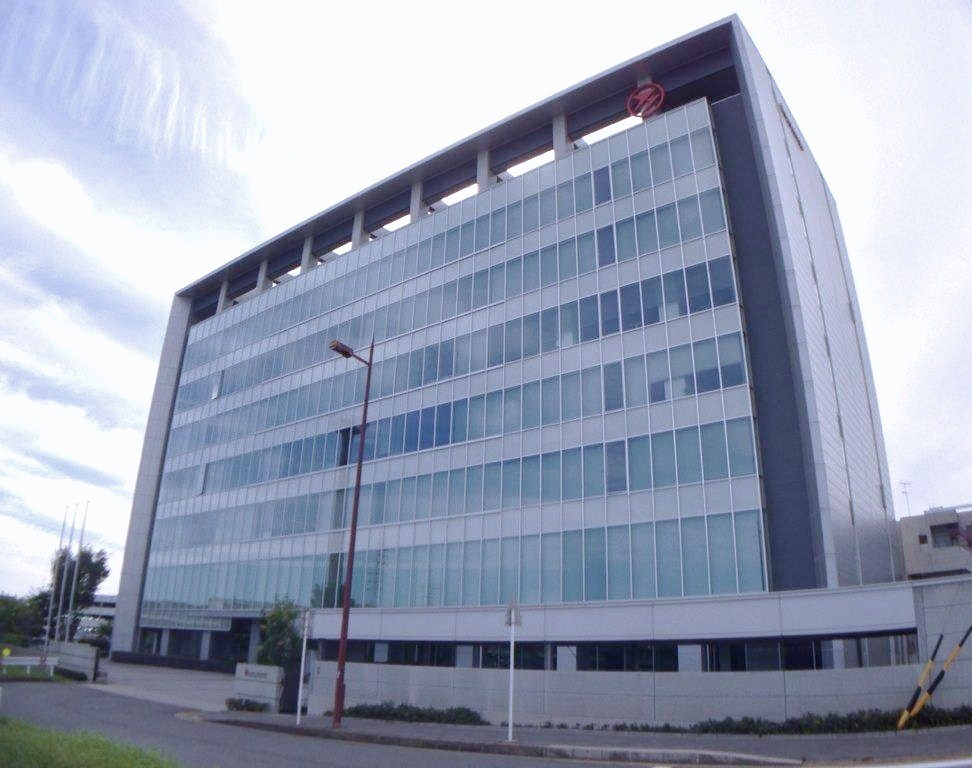 豊田鉄工本社